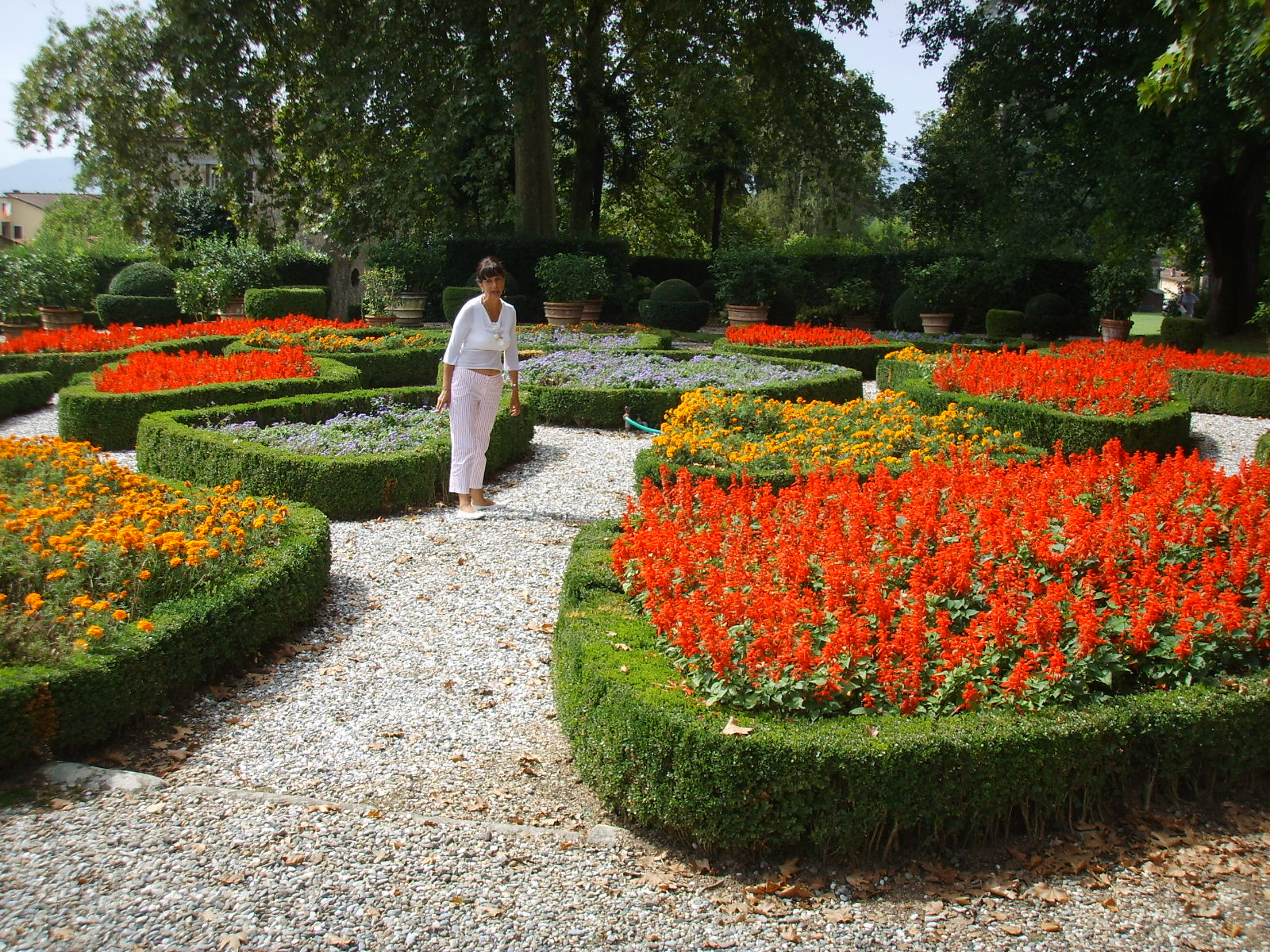 Villa torrigiani di lucca, aiuole